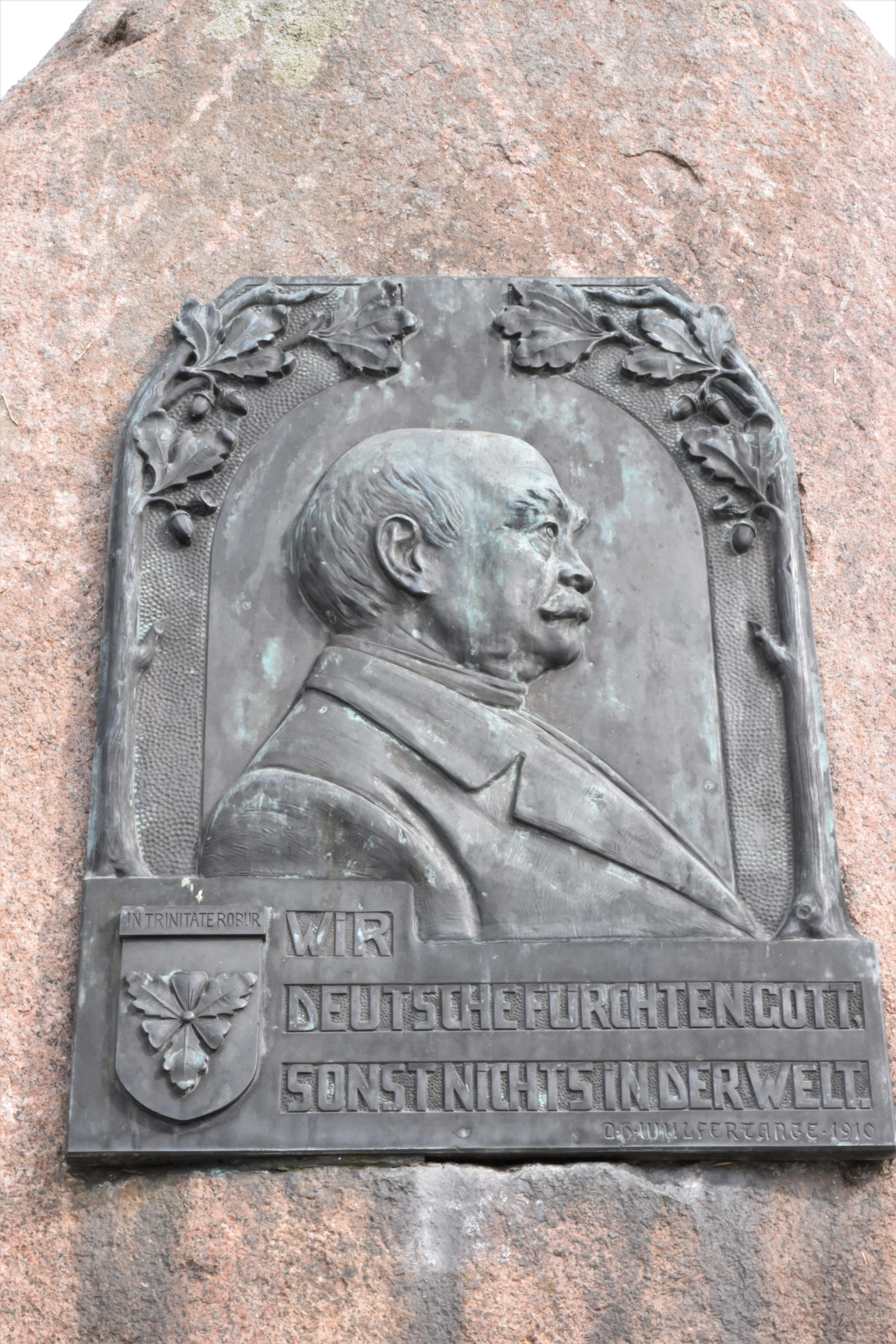 Das Bismarckdenkmal in Badbergen